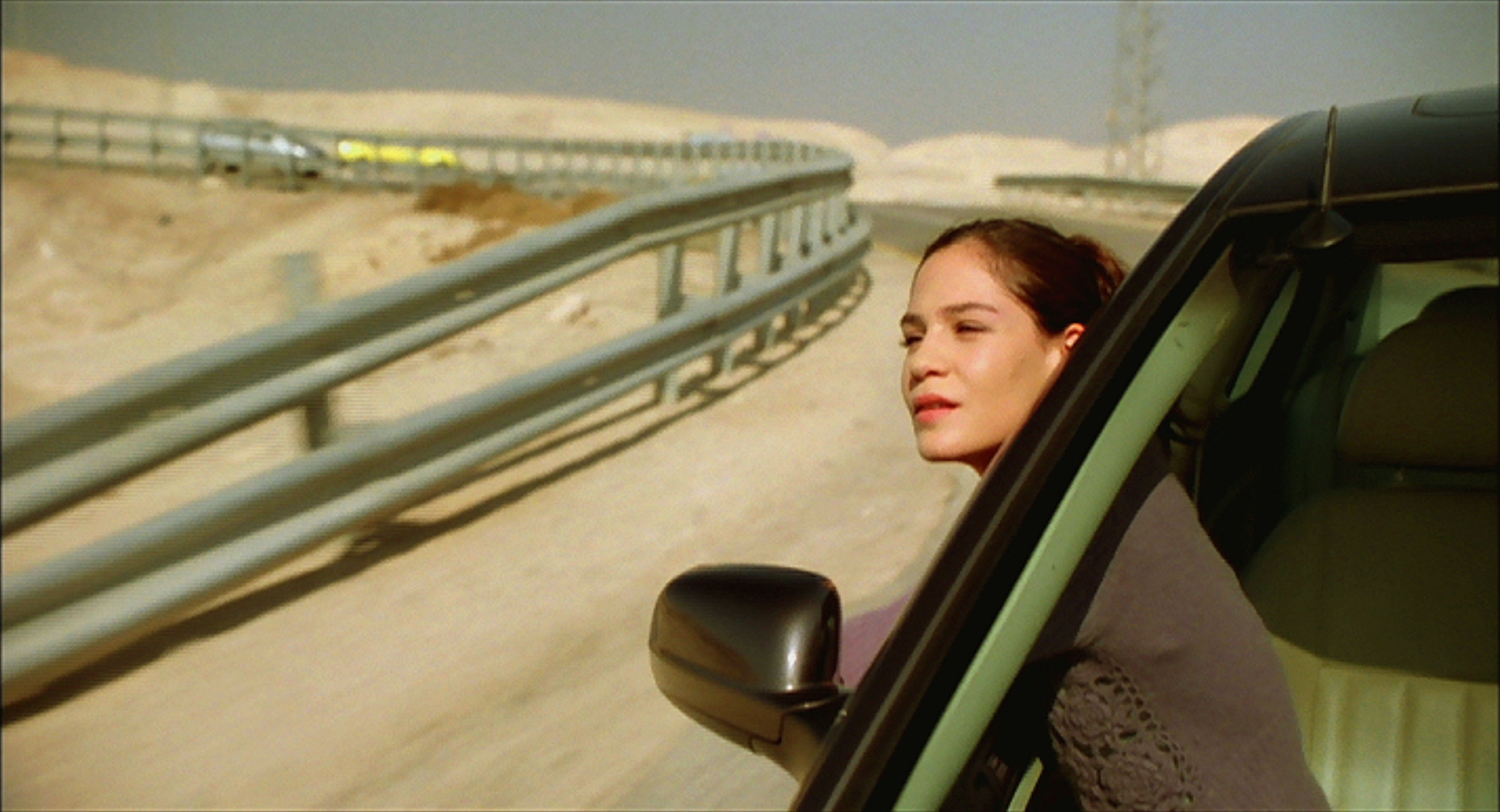 יערה (נטע גרטי) בעכו, בסרטה של מריה שרדר "חיי אהבה", 2007